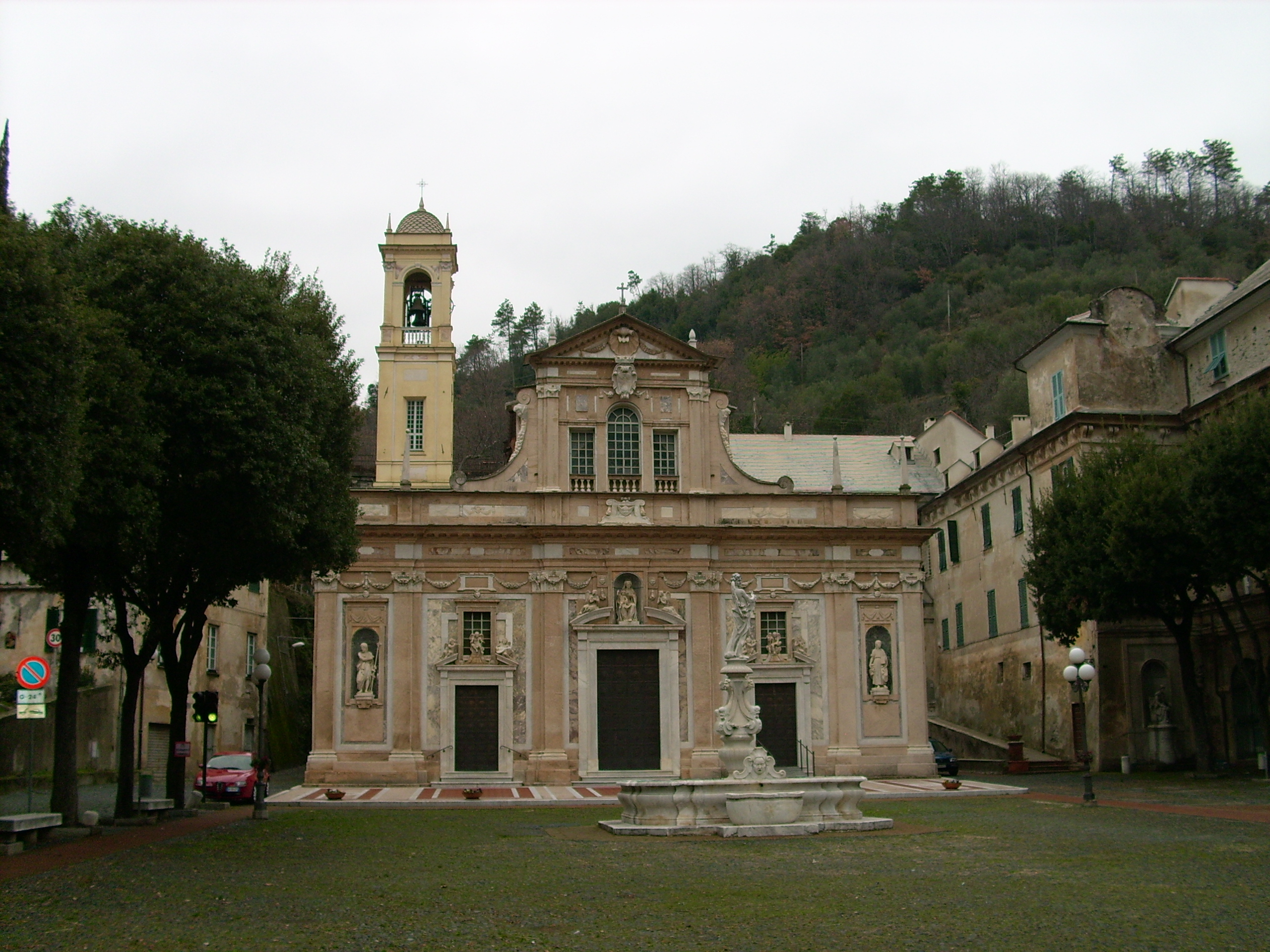 Santuario di Nostra Signora della Misericordia, Savona, Liguria, Italy